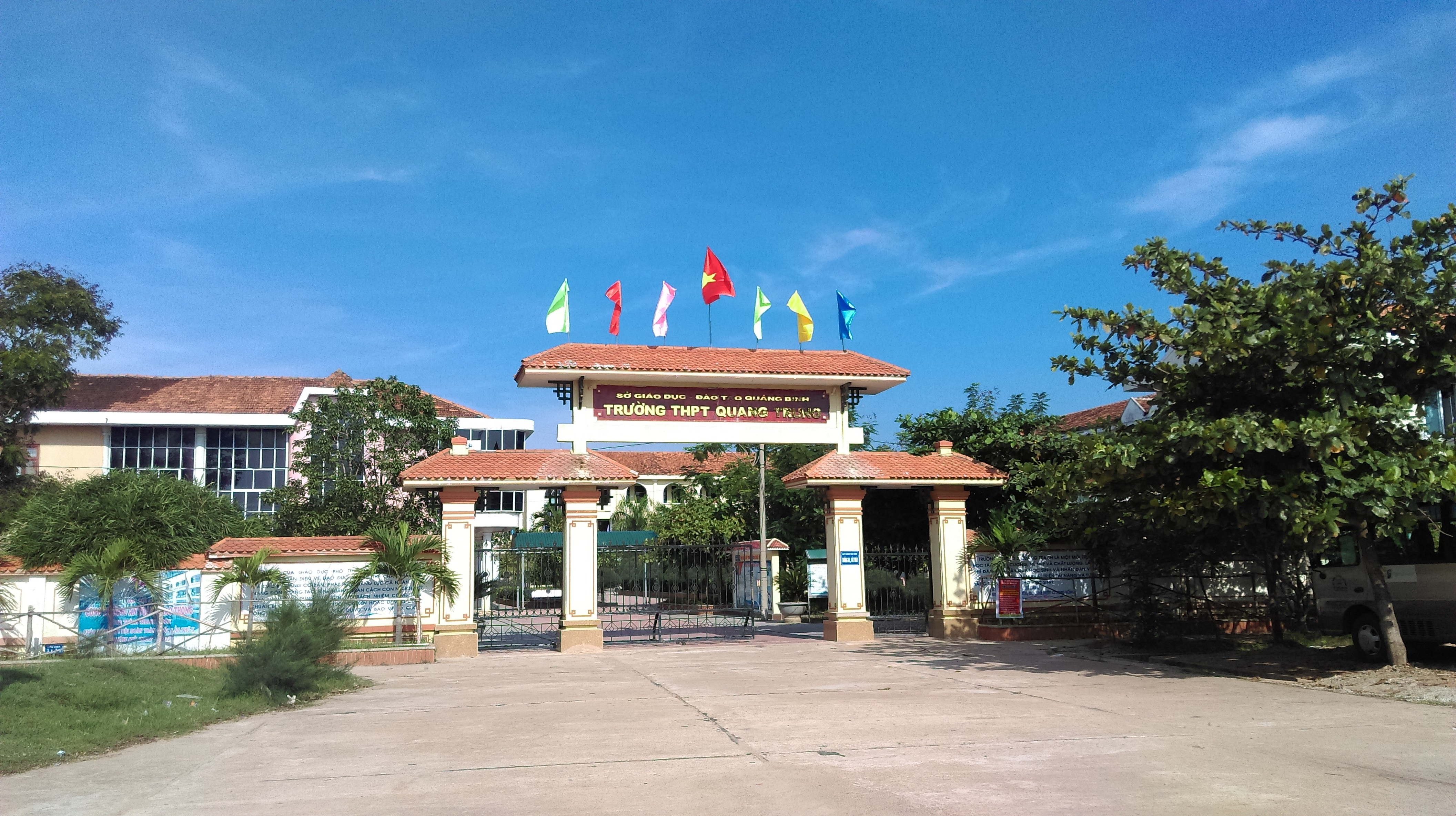 Trường THPT Quang Trung, Quảng Phú, Quảng Trạch, Quảng Bình